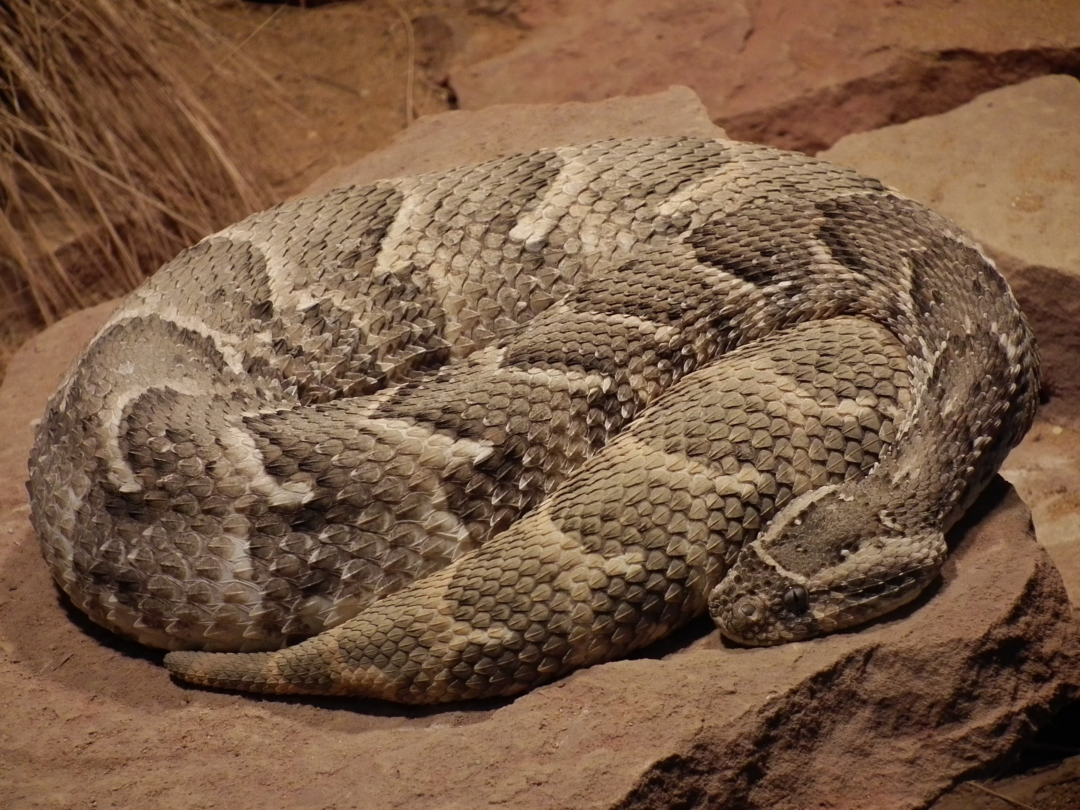 Puffotter (Bitis arietans) im Vivarium Darmstadt (Hessen, Deutschland)